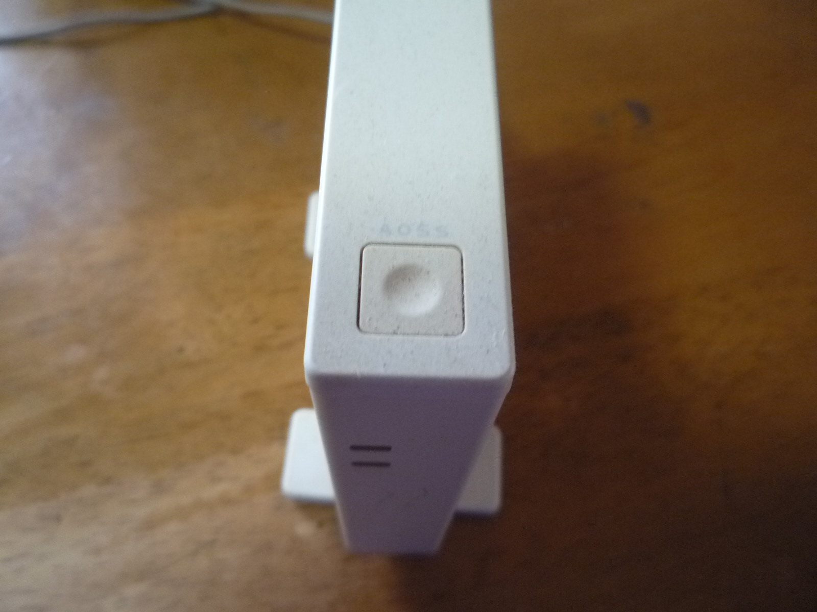 任天堂Wi-Fiネットワークアダプター(WAP-001)にあるAOSSボタン